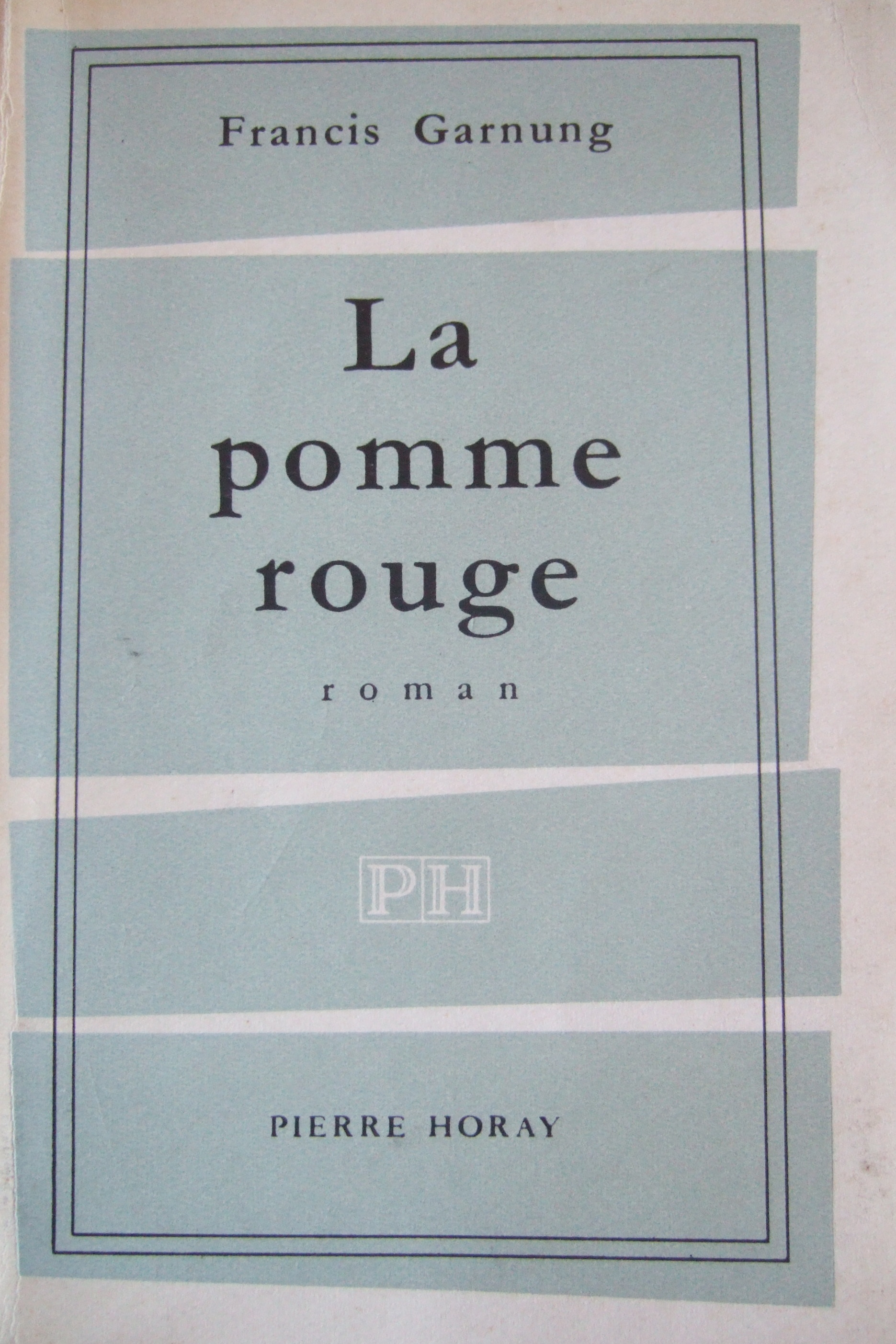 La Pomme Rouge, chez Pierre Horay 1956